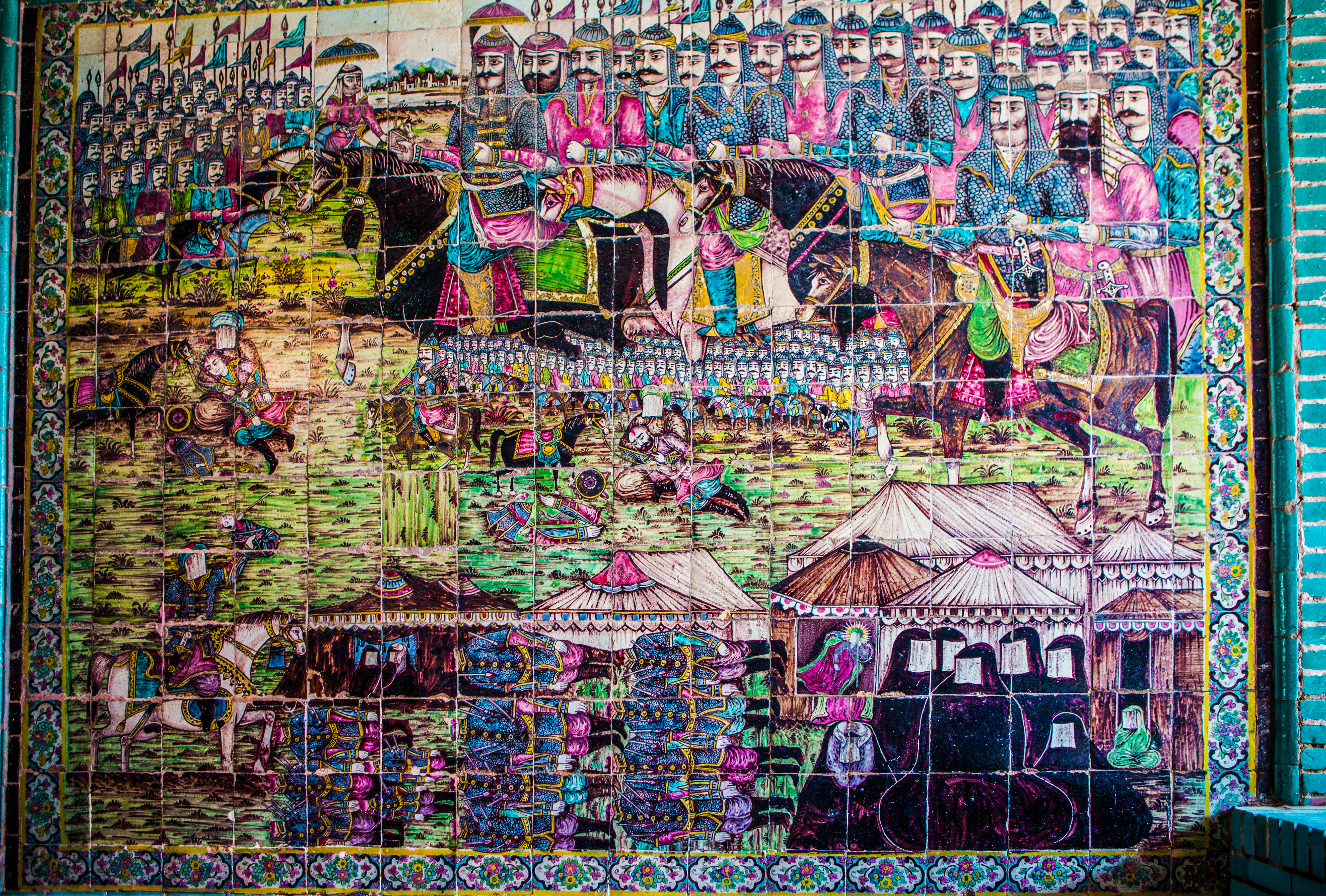 کاشیکاری «صحنه ی جنگ امام حسین و یزیدیان در صحرای کربلا ( ظهر عاشورا )» از جمله کاشیکاری‌های موجود در تکیه معاون‌الملک کرمانشاه می‌باشد.